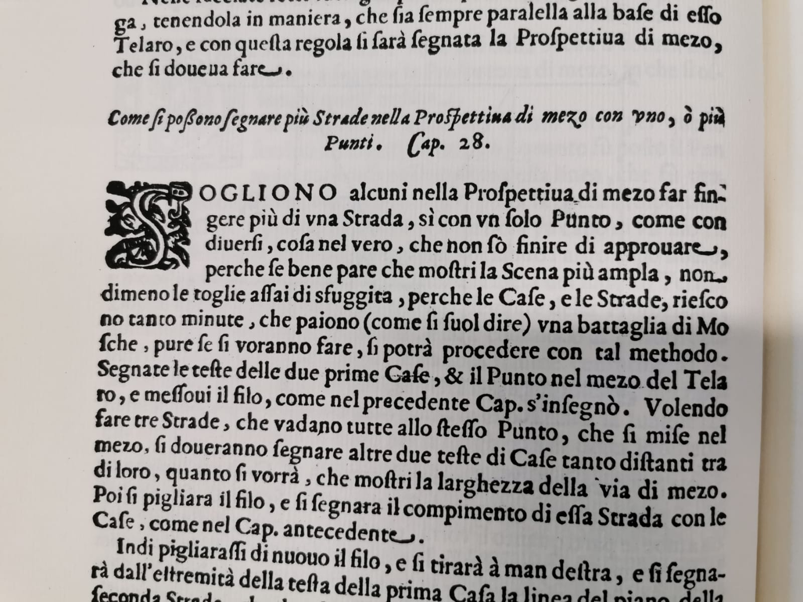 Quellentext von Kapitel 28.